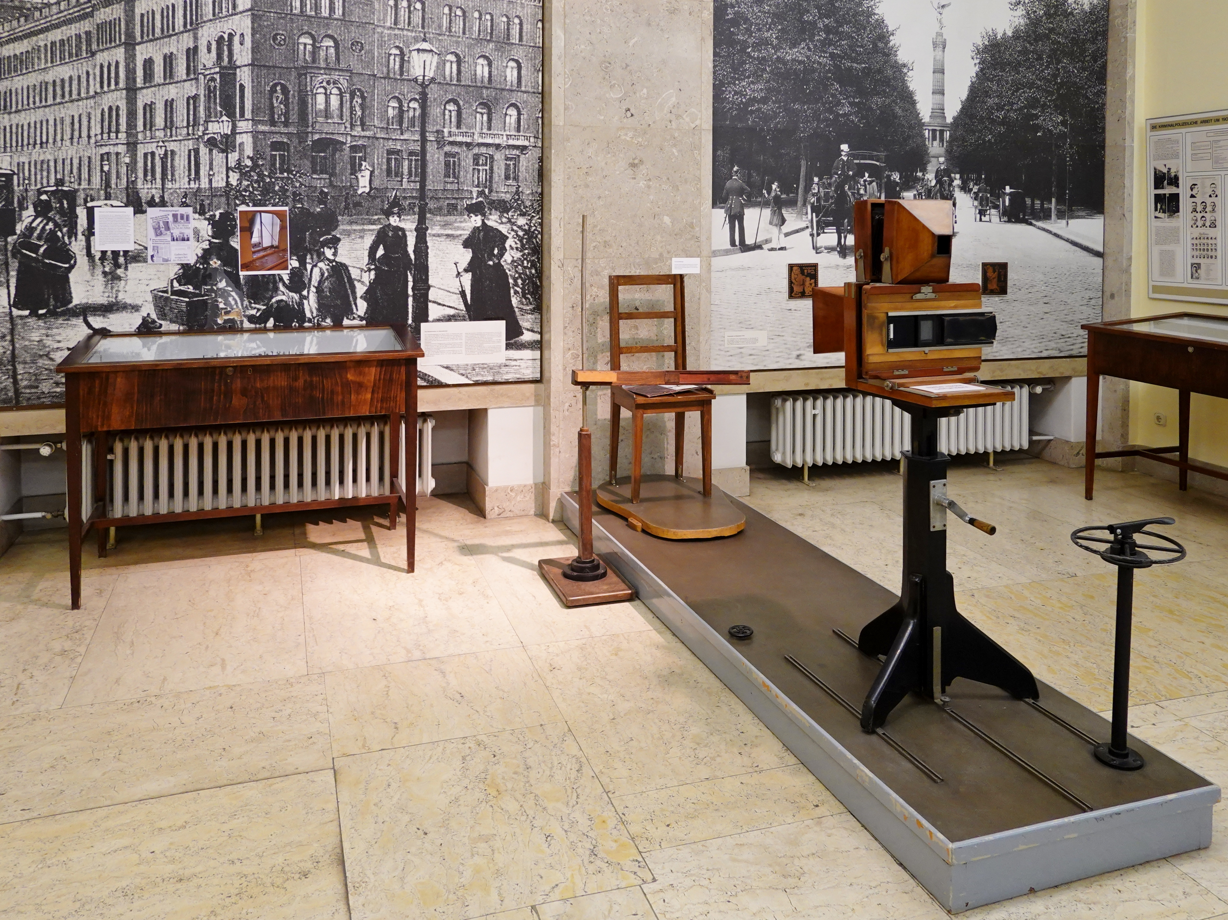 Polizeihistorische Sammlung in Berlin, Polizeipräsidium im Gebäude des Flughafens Tempelhof, Berlin, Deutschland